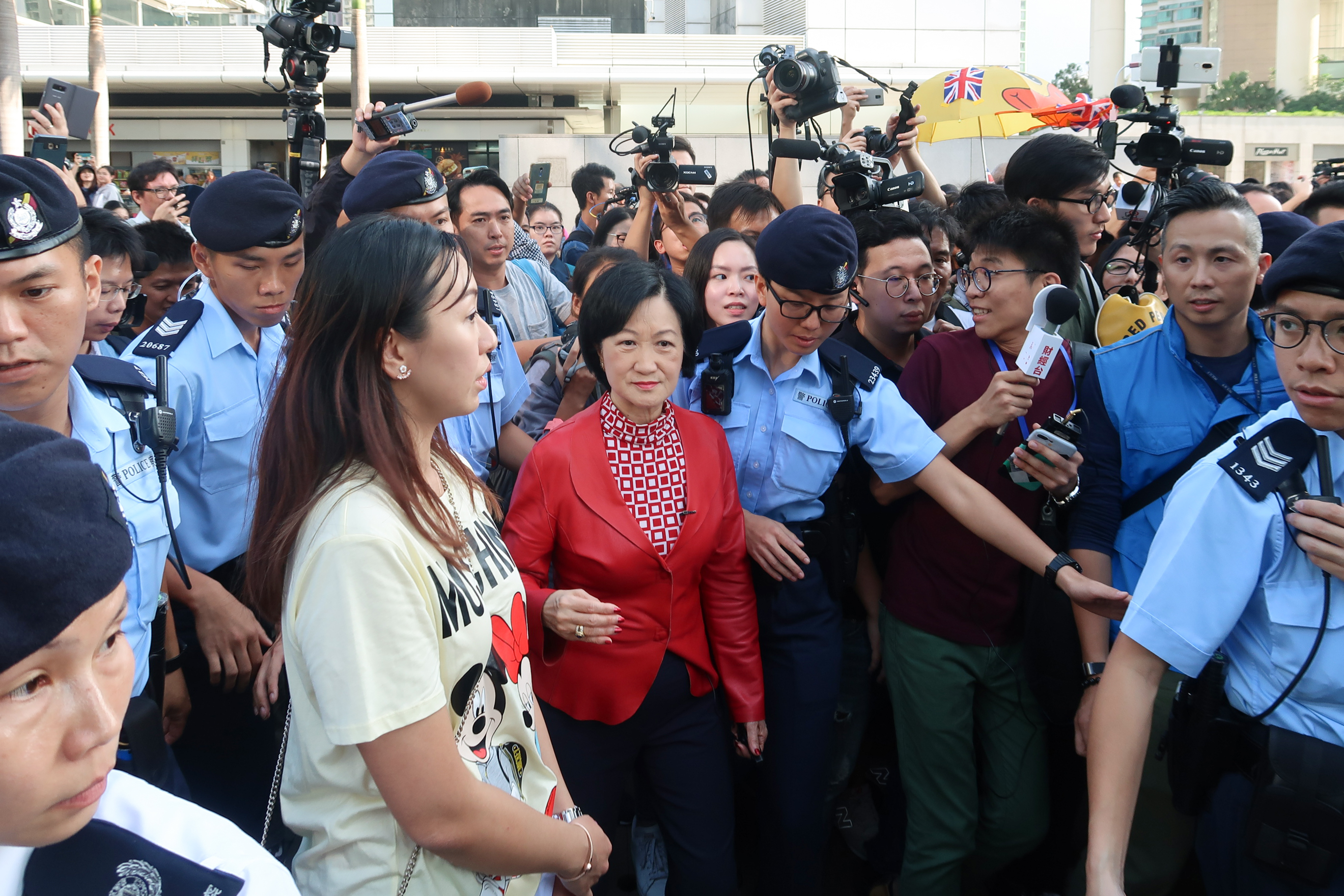 Regina Ip visit Tung Chung